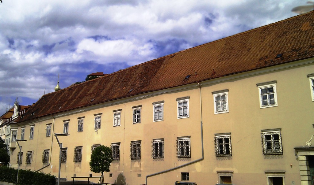 Admonterhof, Kaiser-Franz-Josef-Kai 10-12, Graz